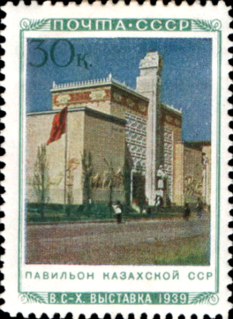 Серия «Всесоюзная сельскохозяйственная выставка в Москве»: павильон Казахской ССР. Трёхцветная автотипия на мелованной бумаге. Рамка — печать типографская, перфорирована: линейная зубцовка 12½ (на каждые 2 сантиметра края марки приходится 12½ зубцов). Официальных разновидностей нет. В марочных листах напечатаны группами в составе разных сюжетов миниатюр.